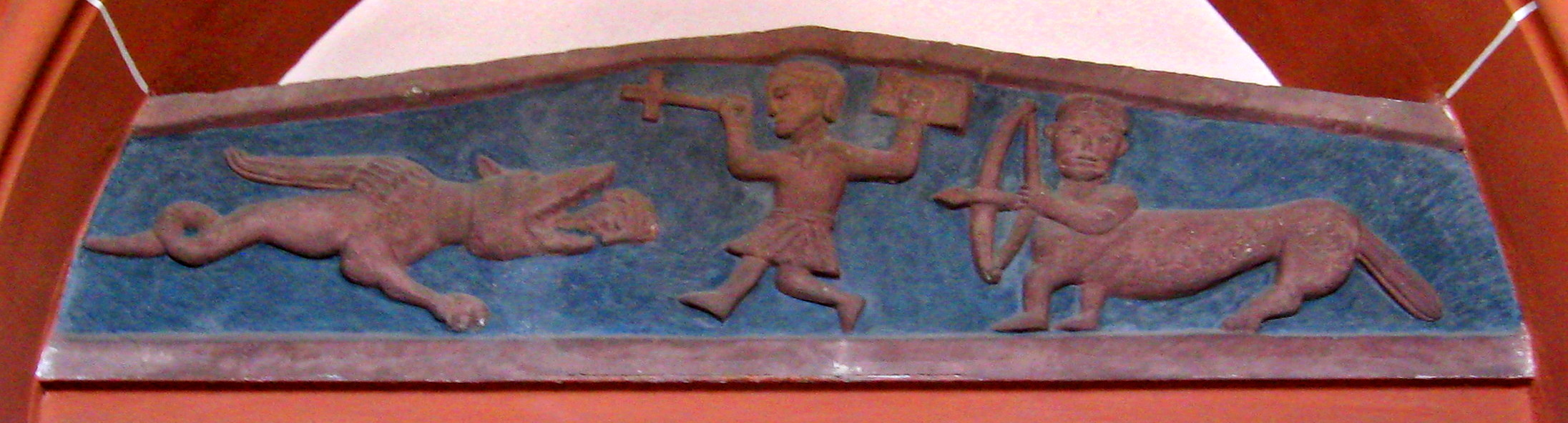 Türsturz in der Kirche in Pachten